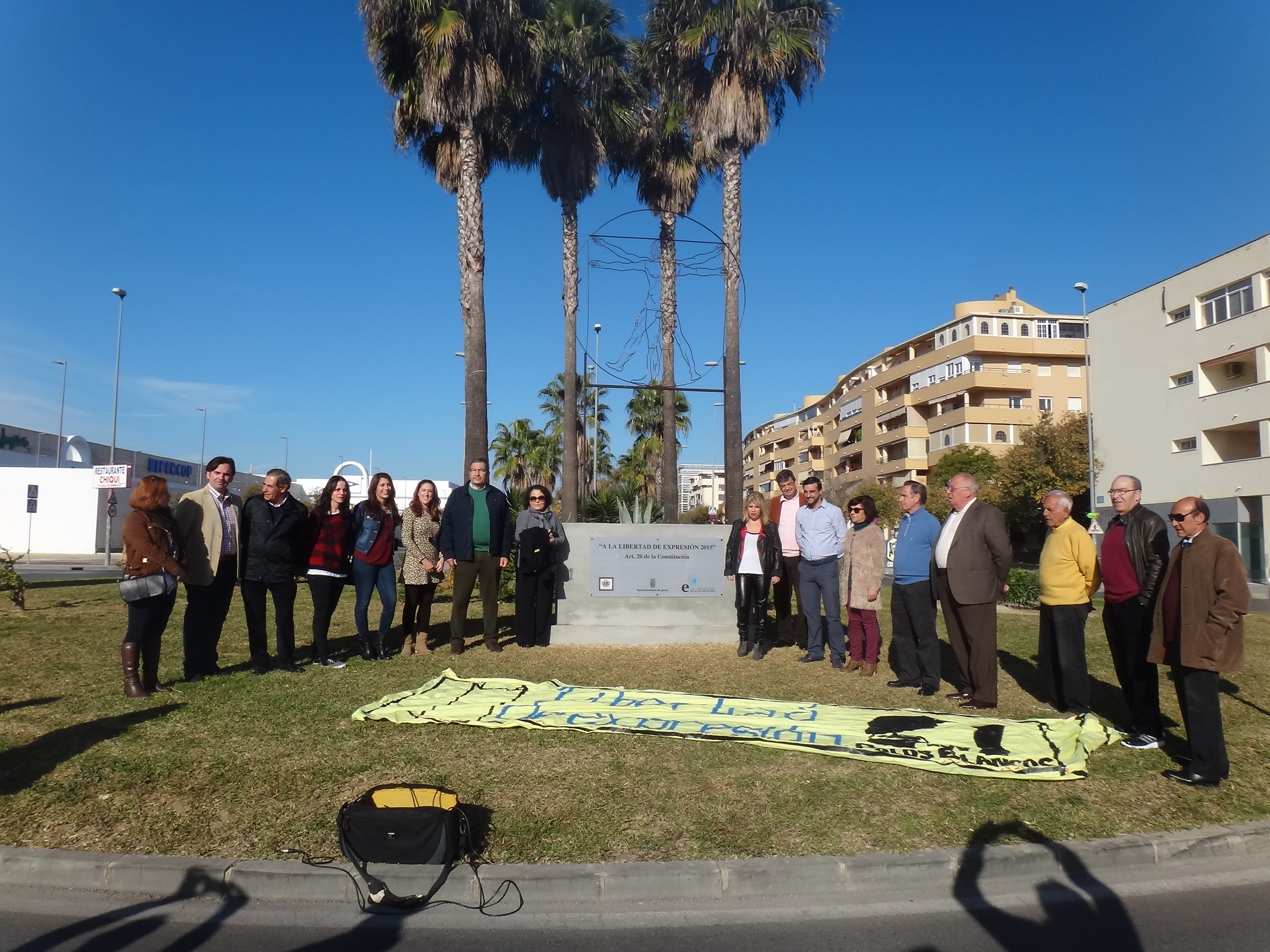 Mamen Sánchez, Alcaldesa de Jerez de la Frontera inaugura un monumento a la Libertad de Expresión. El monumento está basado en el Hombre de Vitruvio de Leonardo Da Vinci, y es obra de las alumnas de la Escuela de Arte de Jerez de la Frontera Patri Gutierrez, Gemma Pineda, Inma Rodríguez y Beatriz Navarra bajo la dirección de Ignacio Caparrini.